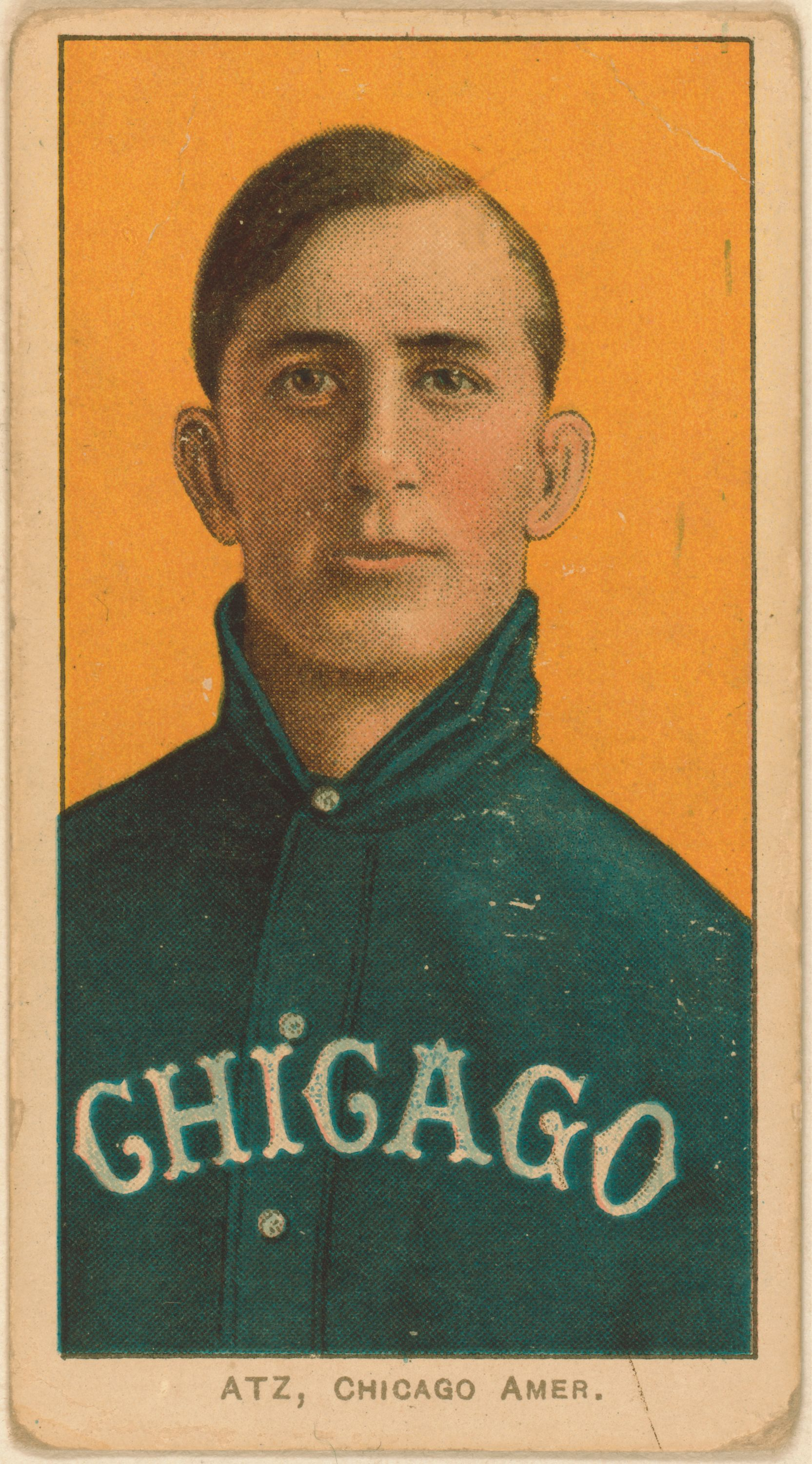 Jake Atz